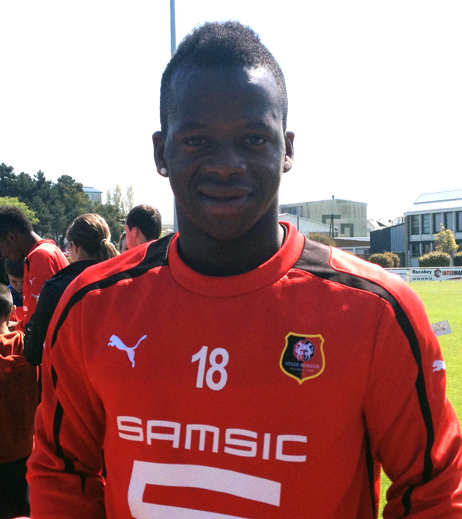 Photo prise lors d'un entraînement du Stade rennais au stade de Marville de Saint-Malo le 3 mai 2013. Photo de Cheick Fantamady Diarra